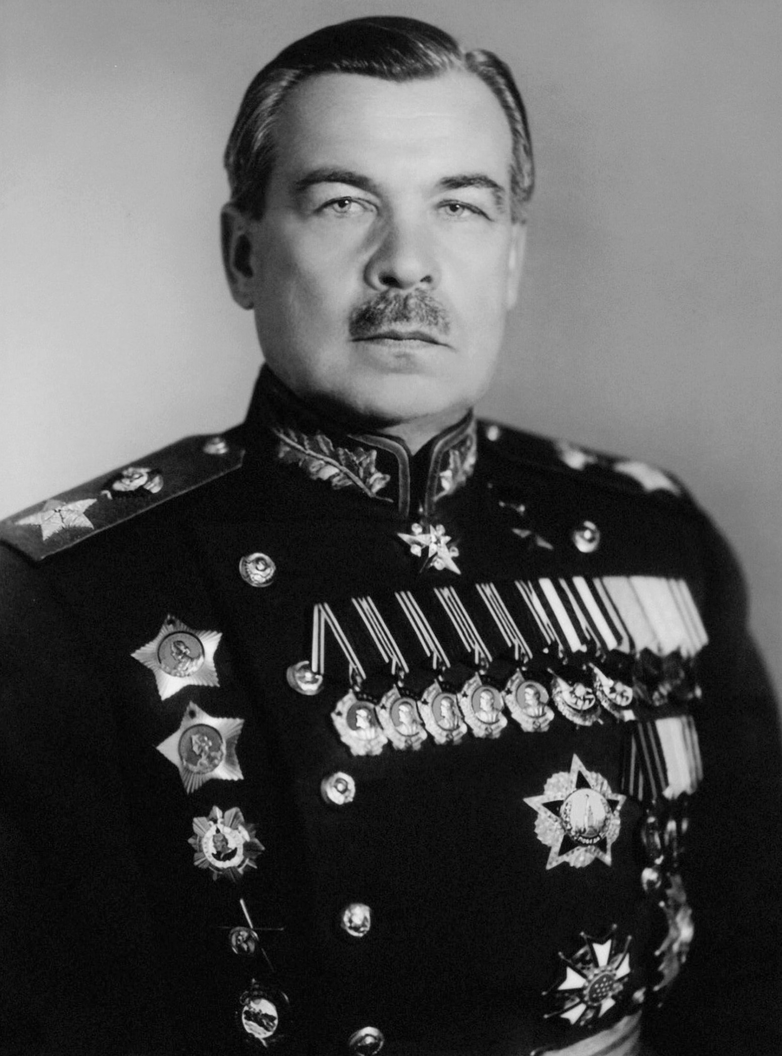 Леонид Александрович Говоров (1897 — 1955) — советский военачальник, Маршал Советского Союза